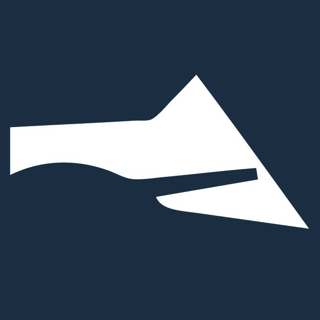 Museo della Guerra Bianca in Adamello di Temù (BS)